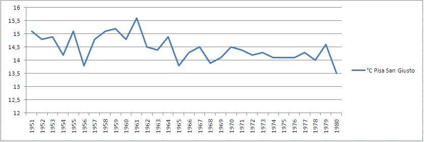 Stazione meteorologica di Pisa San Giusto: andamento della temperatura media annua dal 1951 al 1980